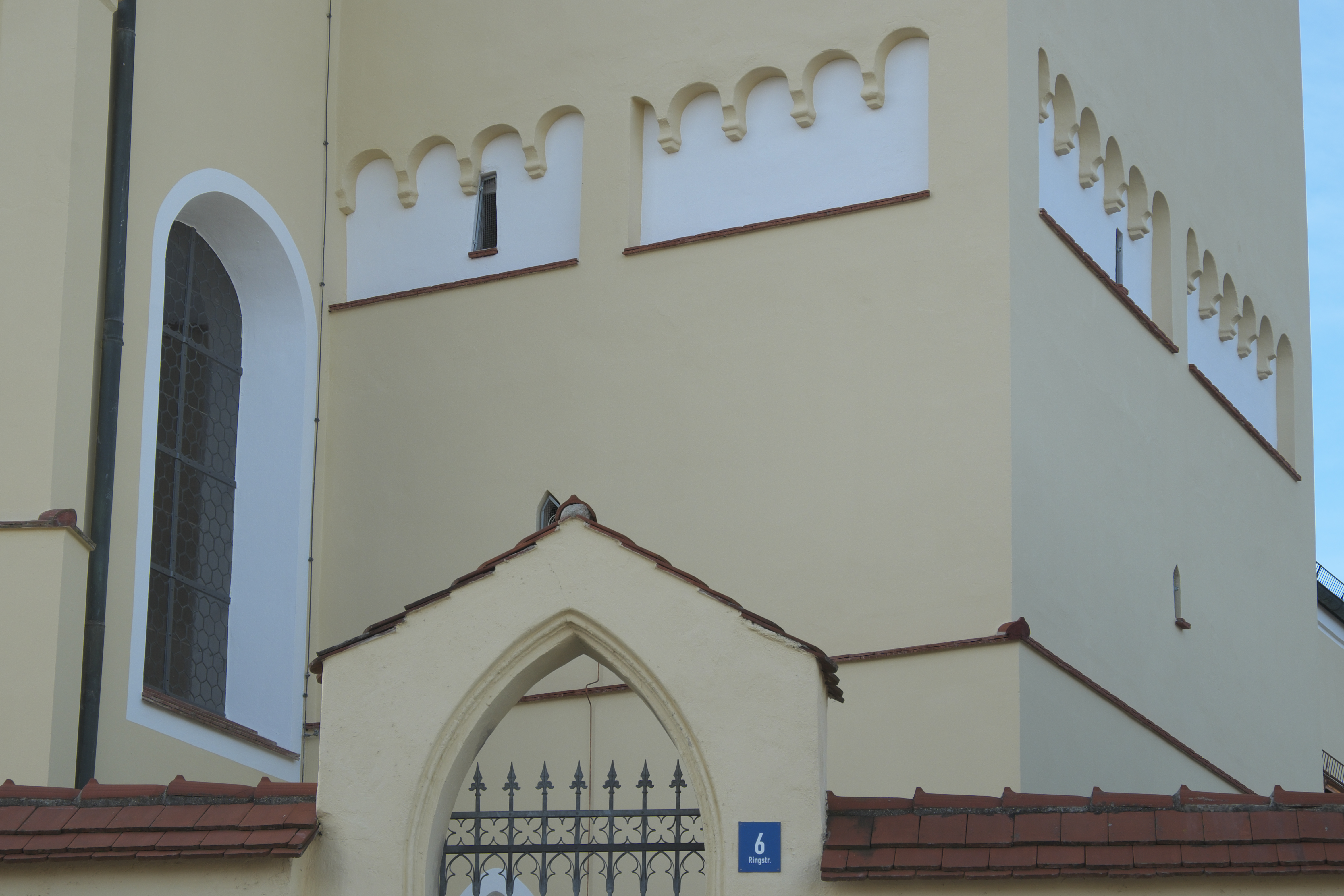 Katholische Pfarrkirche Mariä Heimsuchung in Gosseltshausen (Wolnzach) im Landkreis Pfaffenhofen an der Ilm (Bayern/Deutschland), Blendfelder mit Bogenfriesen am Turm